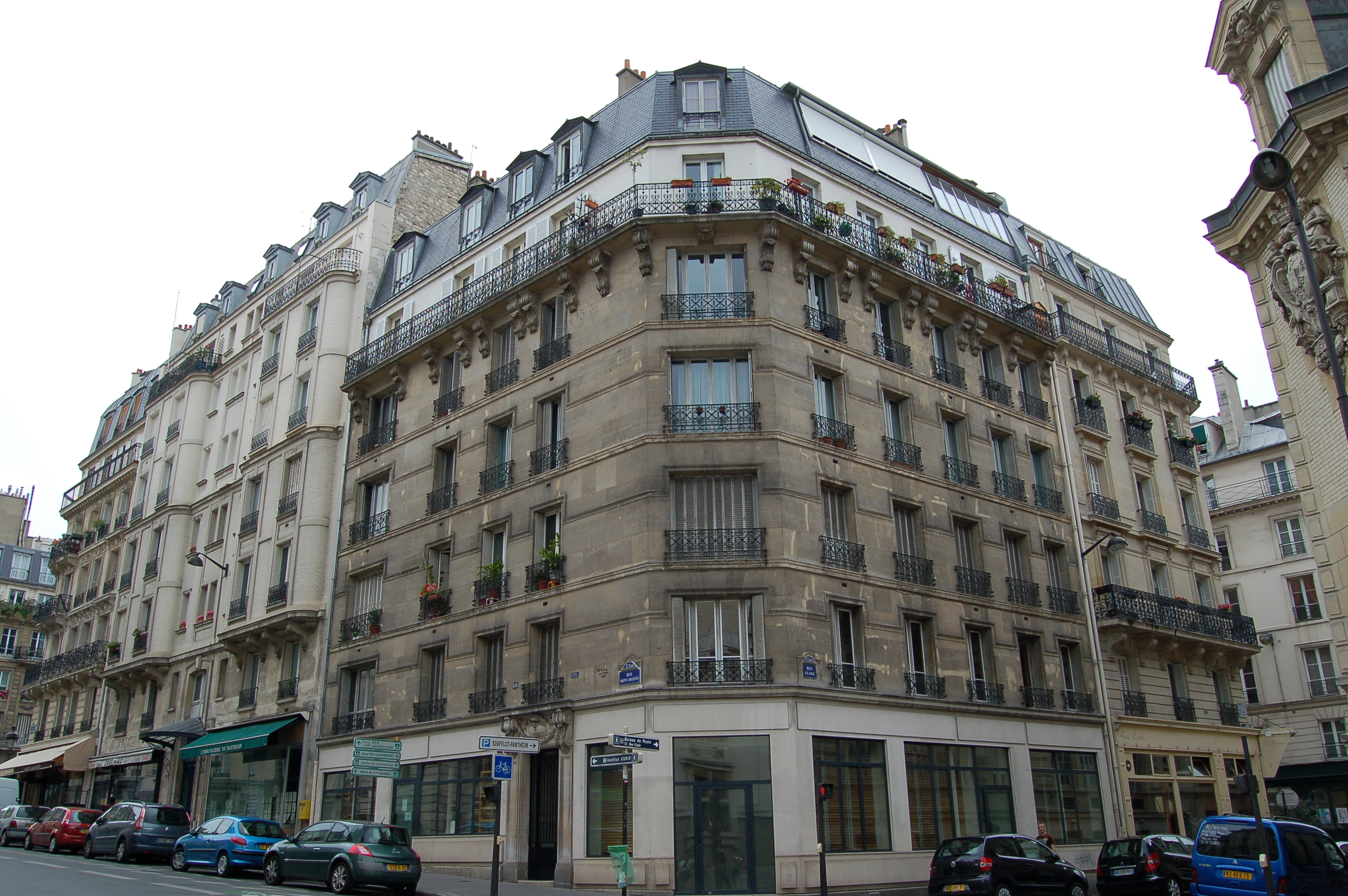 Angle des rues Saint-Jacques et Cujas a Paris